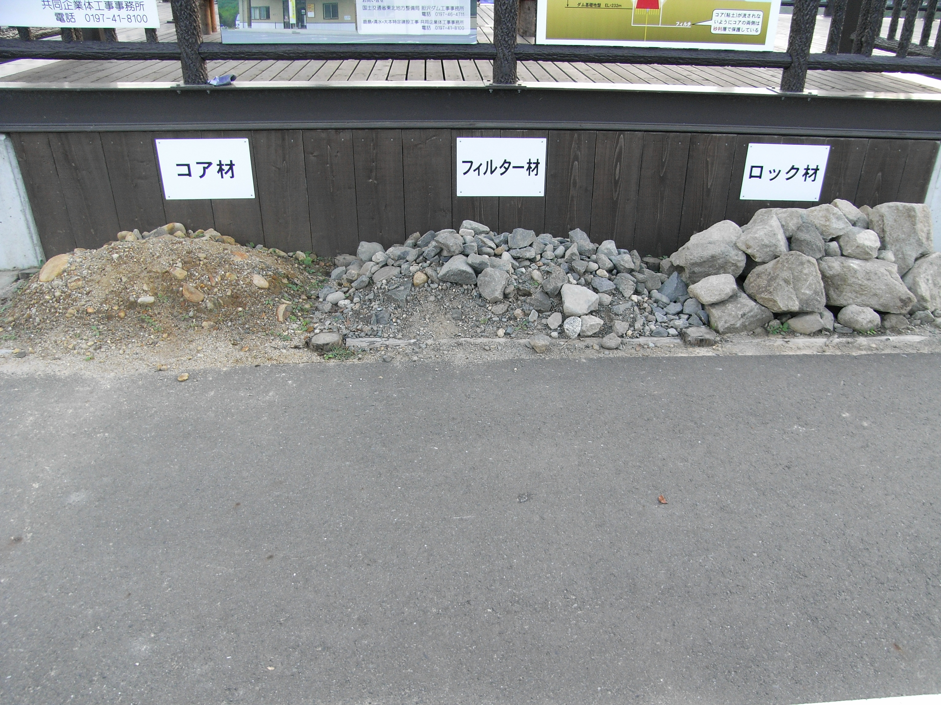 Dam